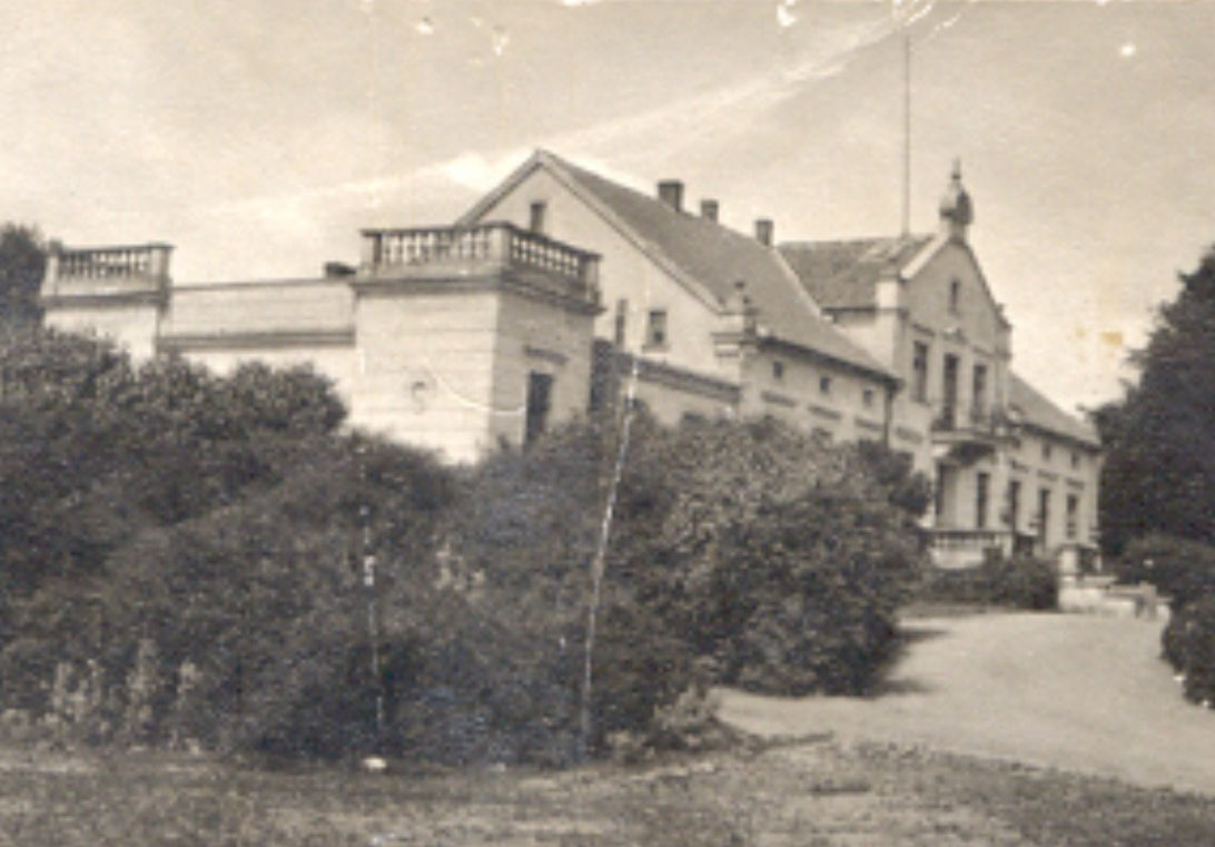 Dwór w Popowej Woli. Manor of Dominium Pfaffendorf, County of Ortelsburg (Prussia), today: Popowa Wola, Powiat Szczycieński (Poland), Owners: Family Rogalla von Bieberstein (about 1885 - 1945)